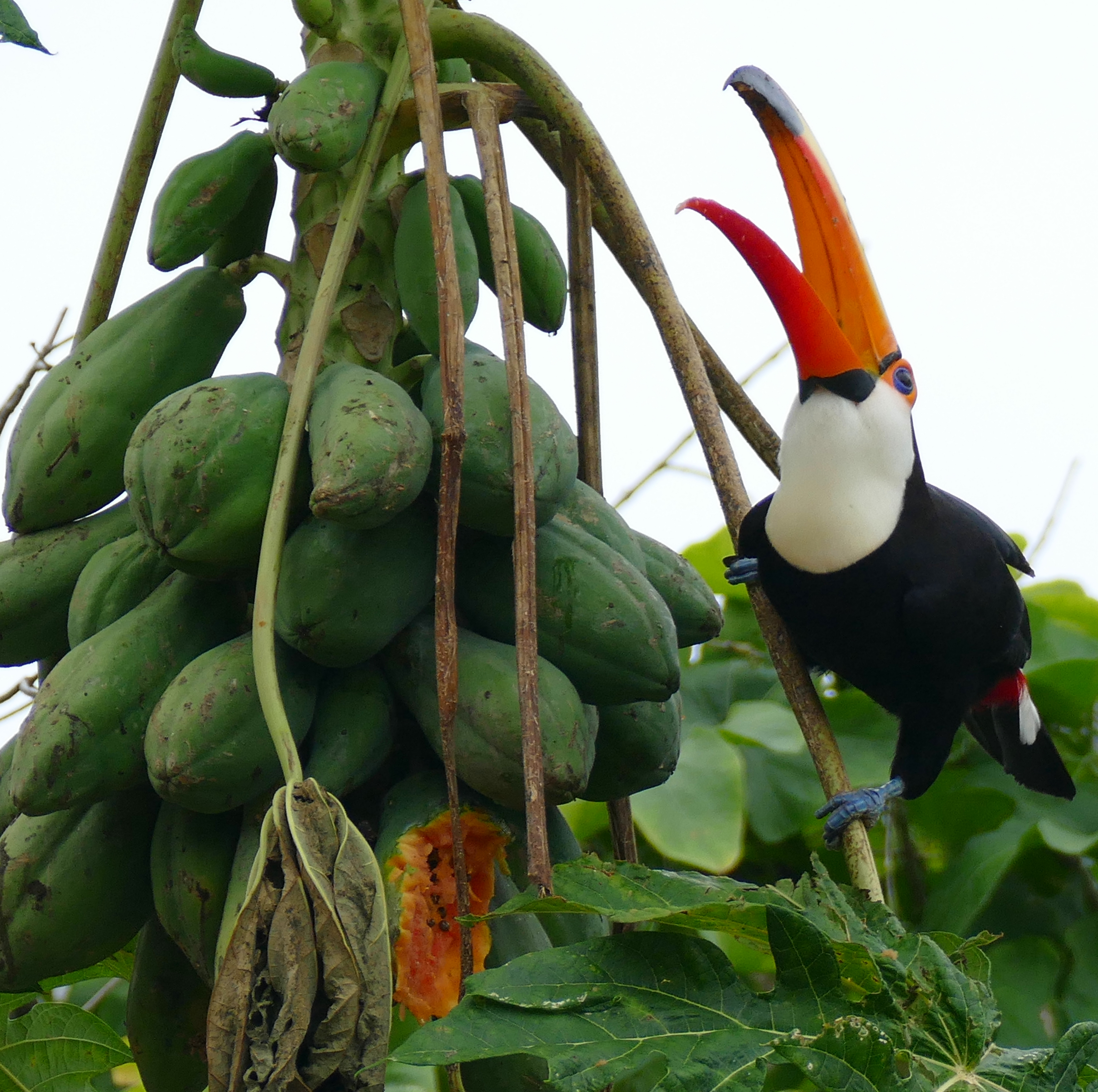 Pouso Alegre, Transpantaneira, Poconé, Mato Grosso, BRAZIL